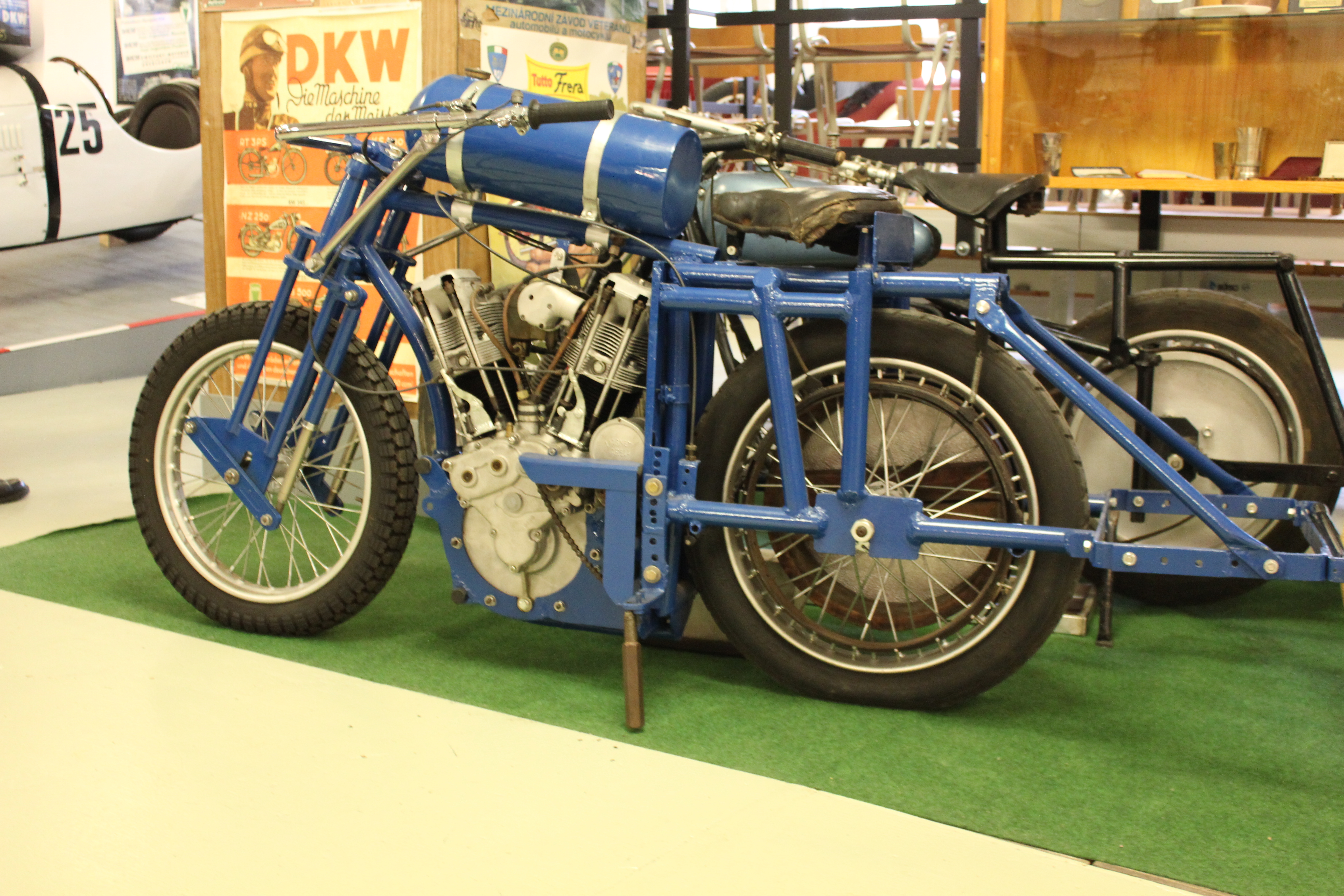 Motorrad für Steherrennen, Exponat des Museums für sächsische Fahrzeuge